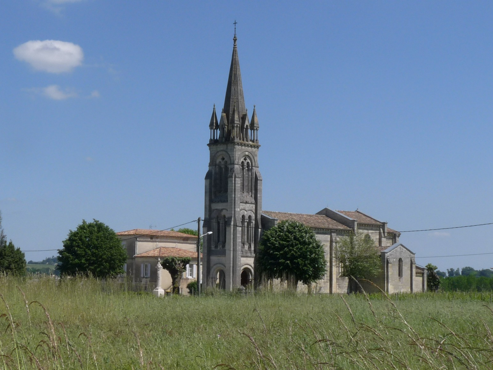 Eglise de Cadillac-en-Fronsadais, Gironde, France